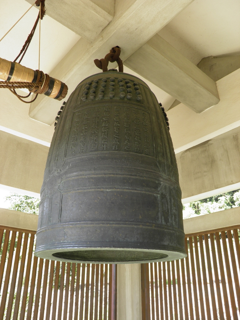 国宝栄山寺梵鐘（奈良県五條市）